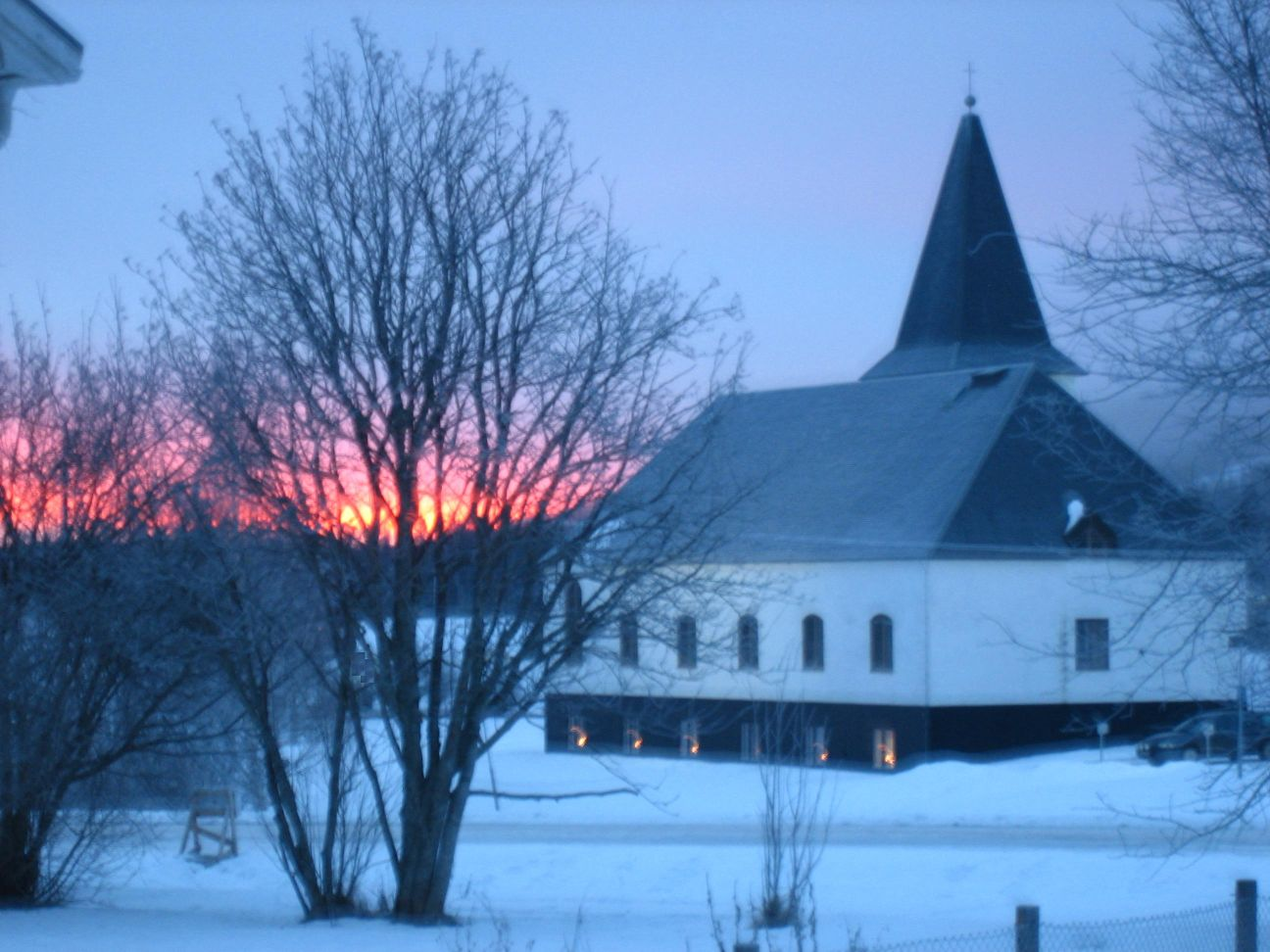 Description by original photographer at Flickr: NL: "Tien uur 's ochtends, half december 2005. Uitzicht vanuit de woonkamer." SE: "Soluppgång klockan 10.00 sett genom vardagsrumfönstret."